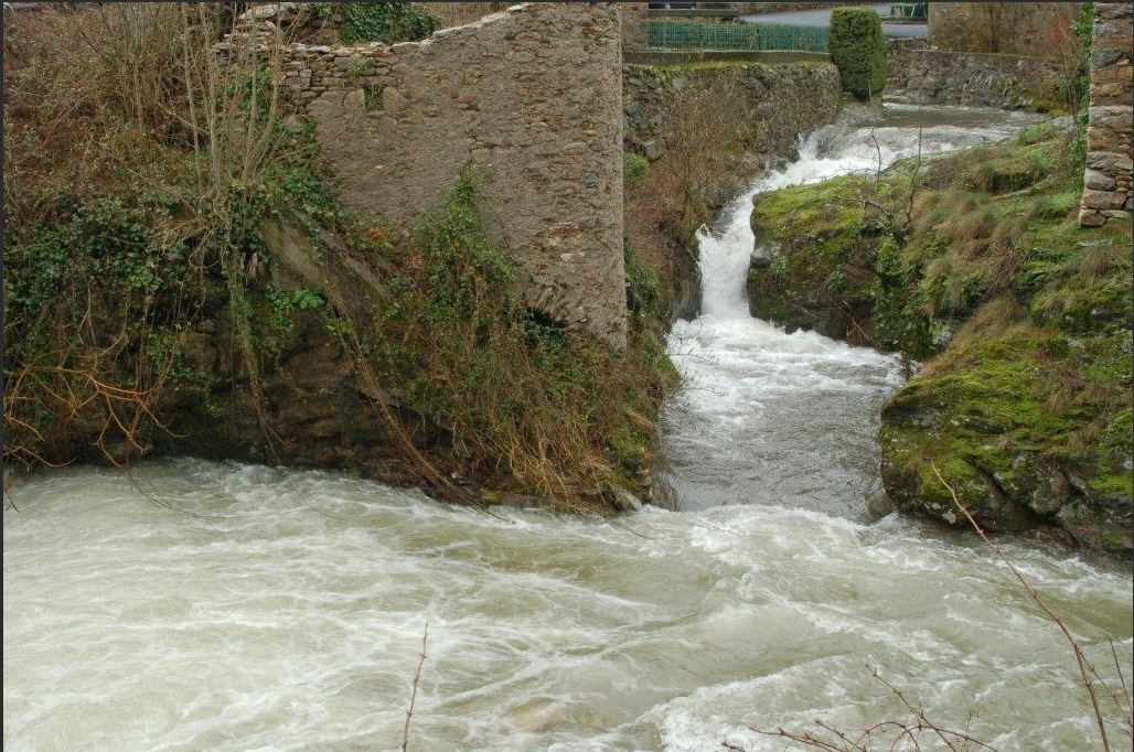 Castanet-le-Haut (Hérault) - Les rivières de la Mare et de Capials un jour d'orage